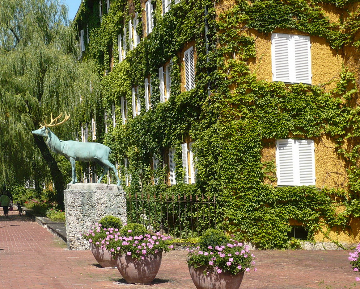 Wohnanlage Borstei in München.